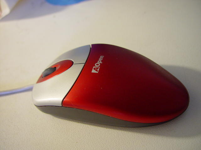 Foto tomada de